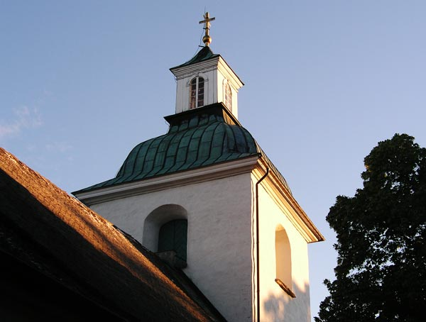 Mikaelikyrkan i Arvika. Västtornet. Foto: Xauxa 2002